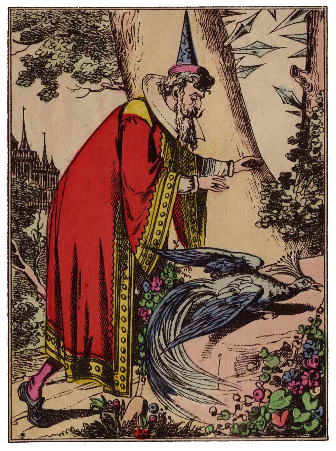 Images d'Épinal : L’Oiseau bleu